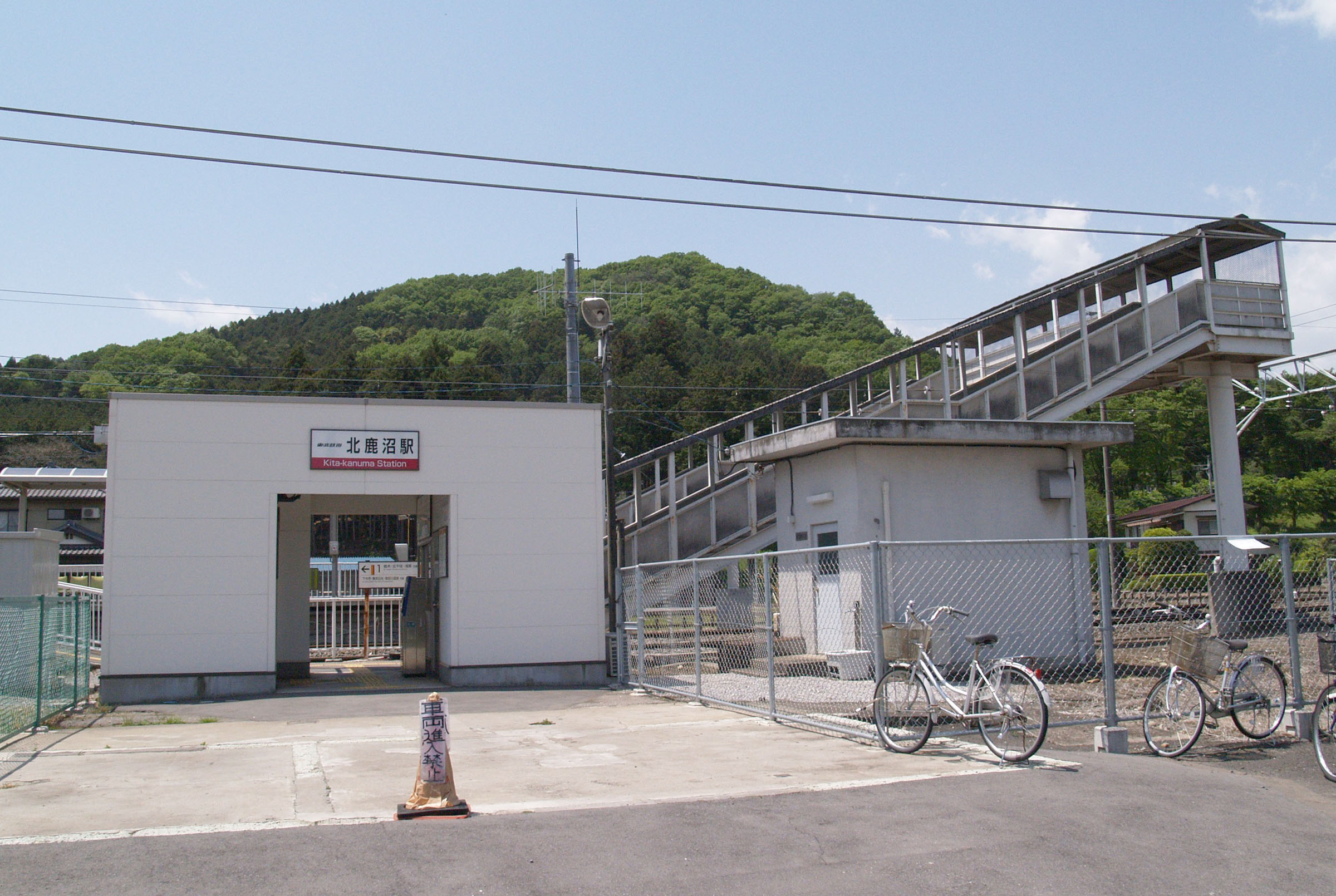 北鹿沼駅